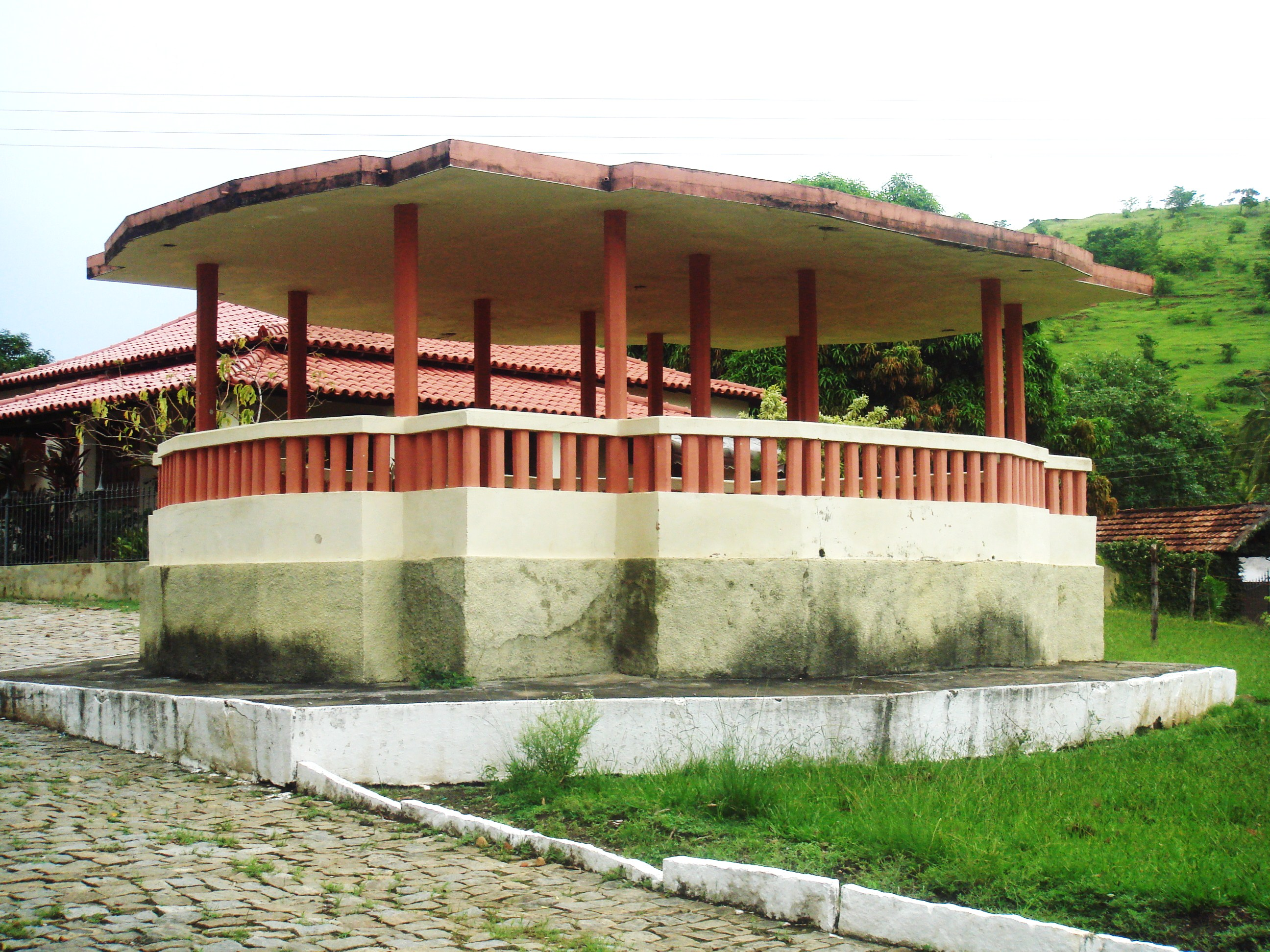 Coreto de Vila Nova